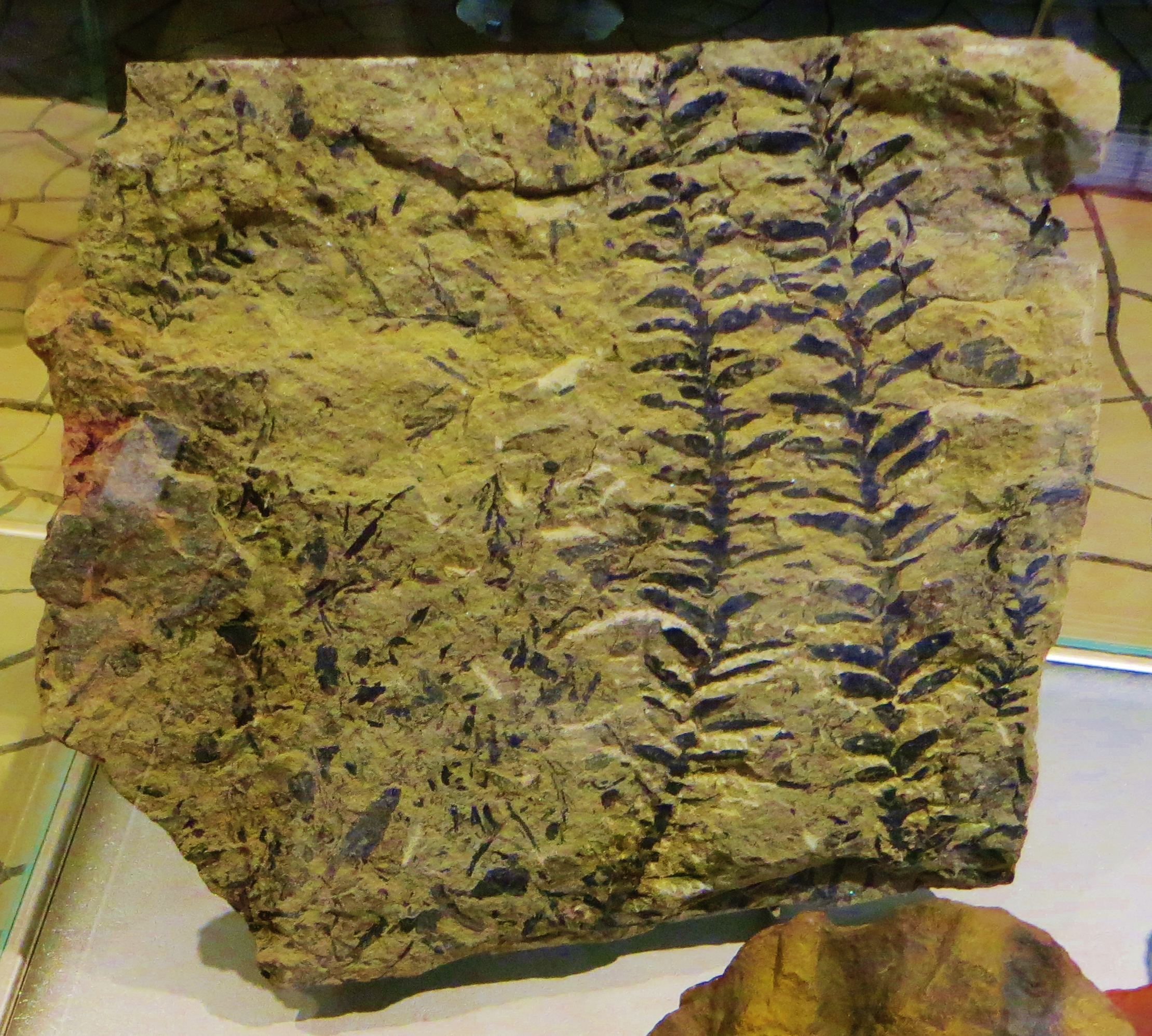 Fossil of Ortiseia, an extinct plant- Took the picture at Muse (Trento)